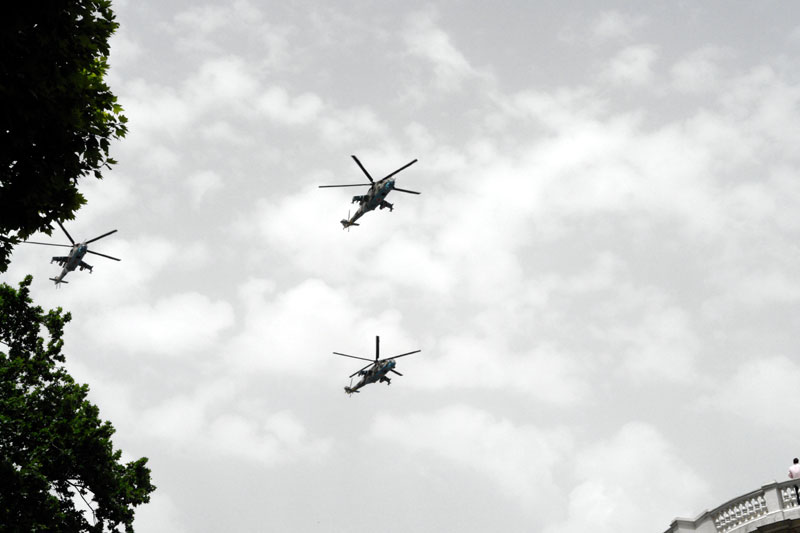 Georgian Mi-24s